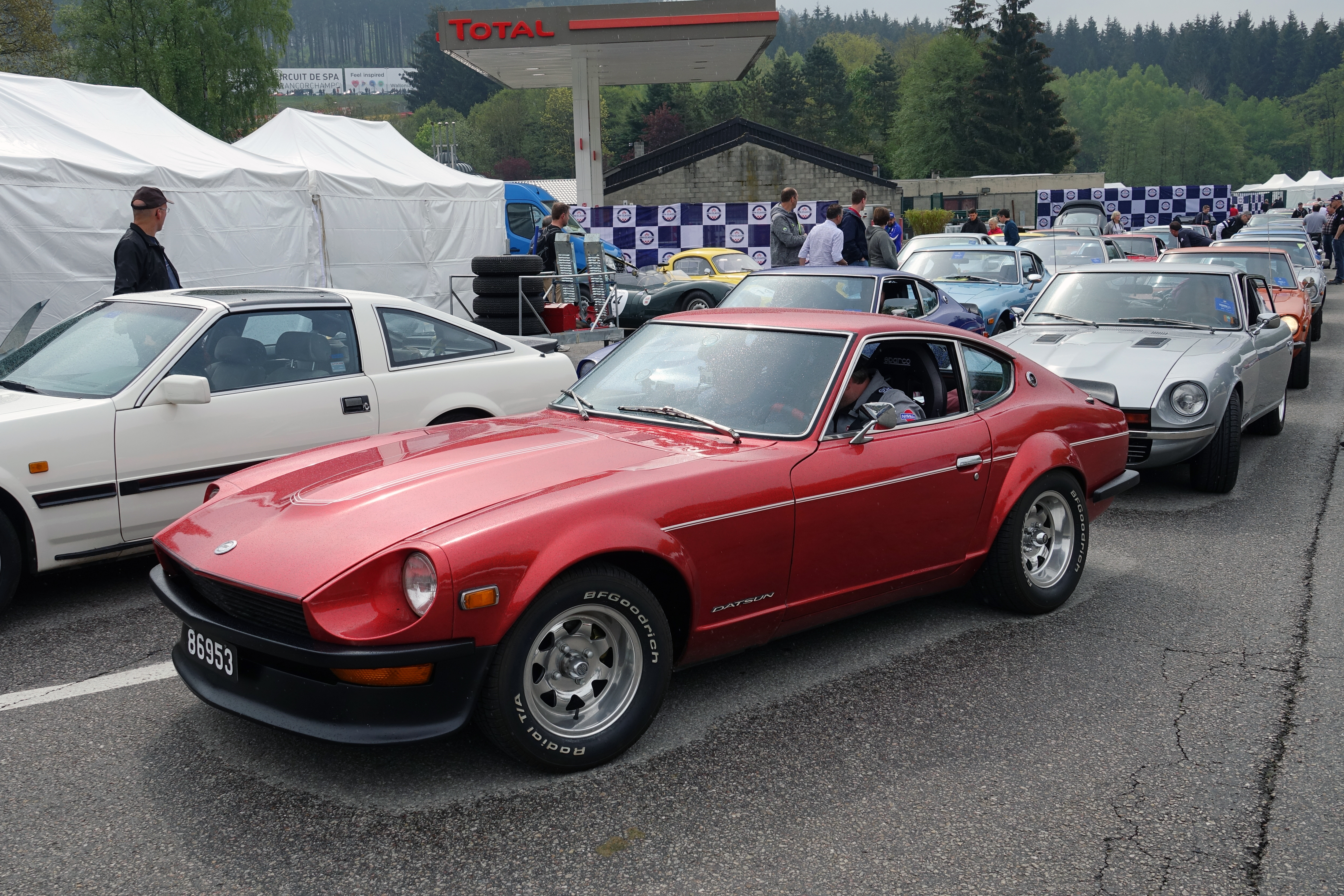 Spa Classic 2019 - 50 ans série Z Datsun